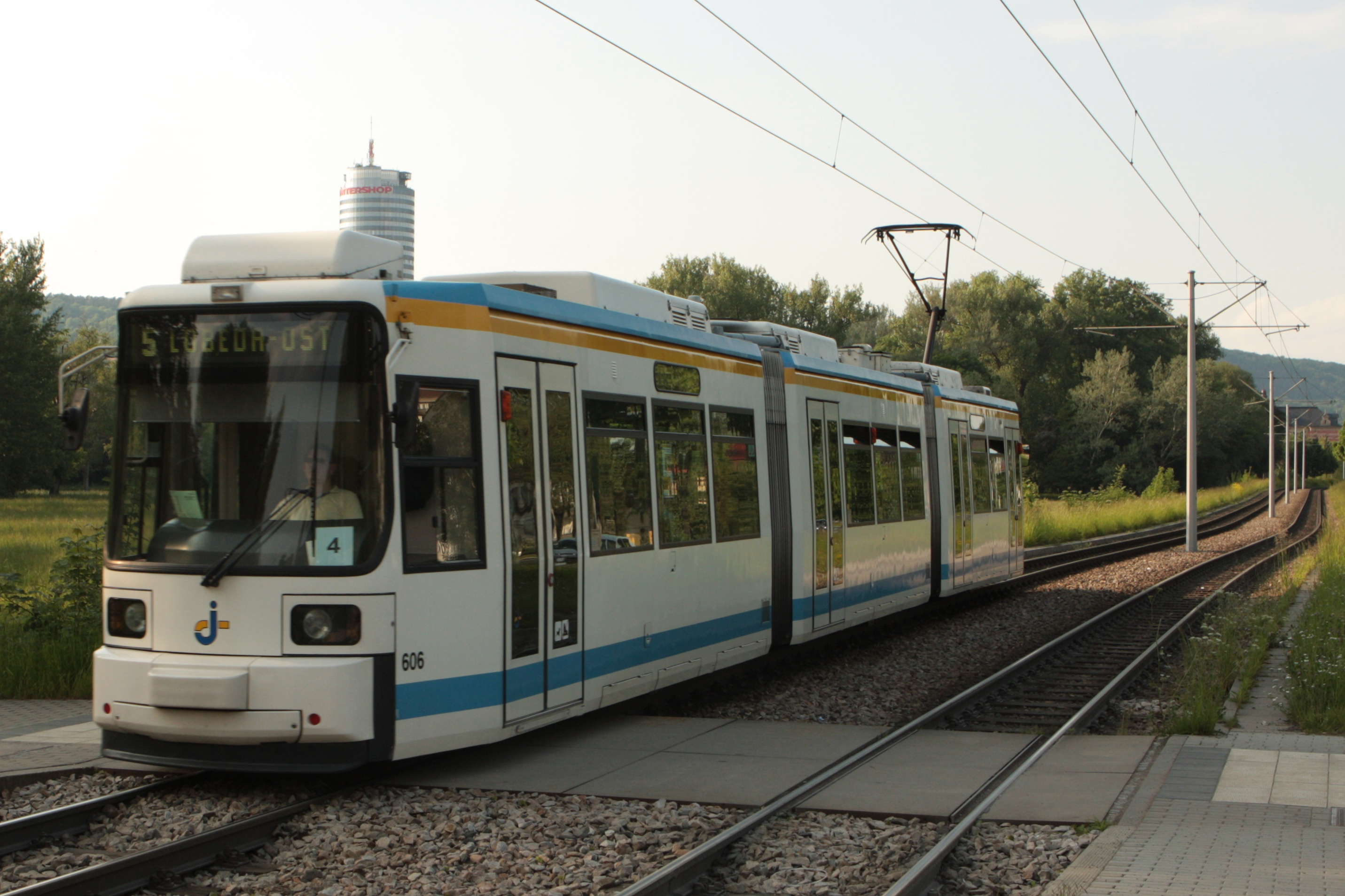 Niederflurstraßenbahn in Jena